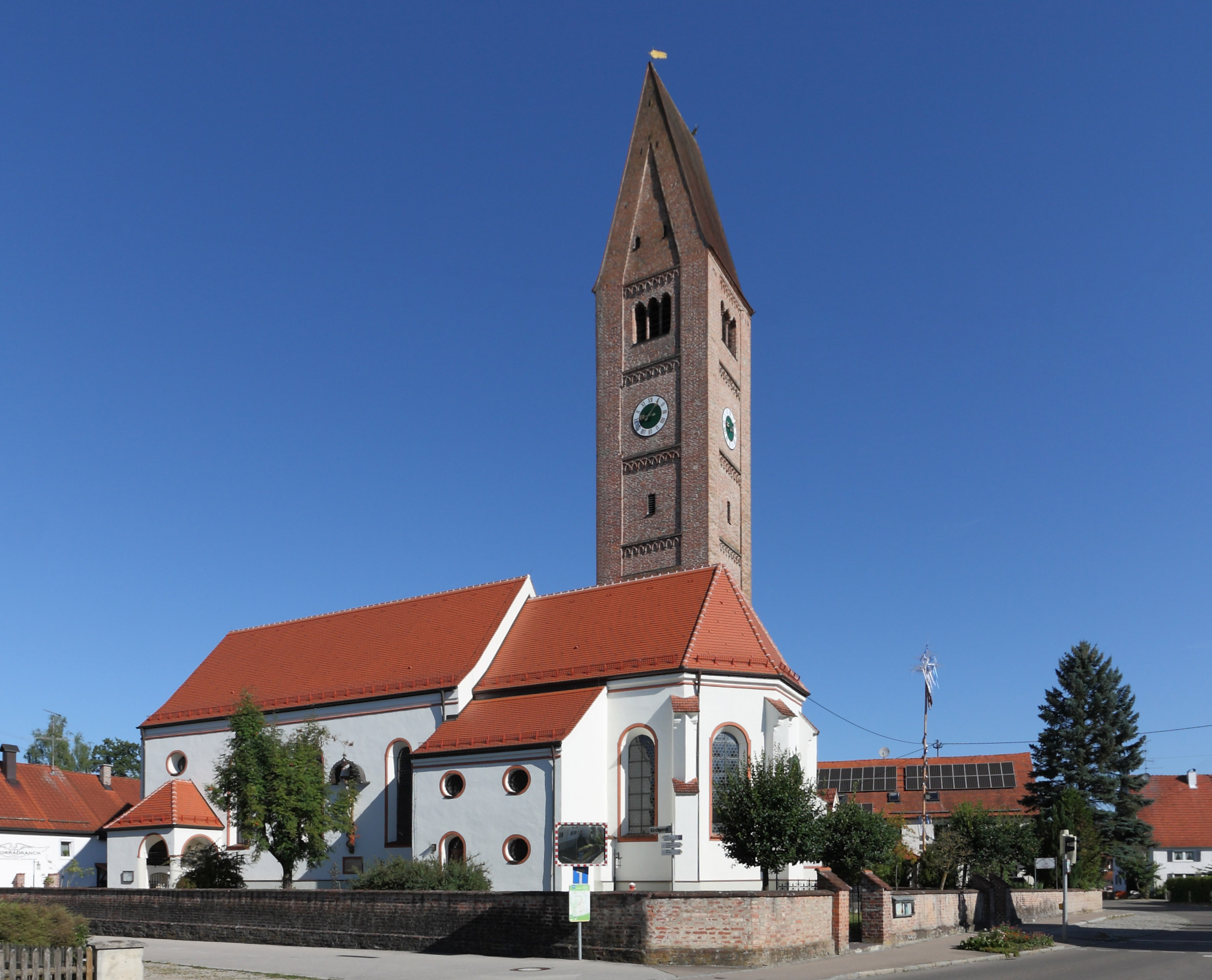 Ansicht der Pfarrkirche von Süden